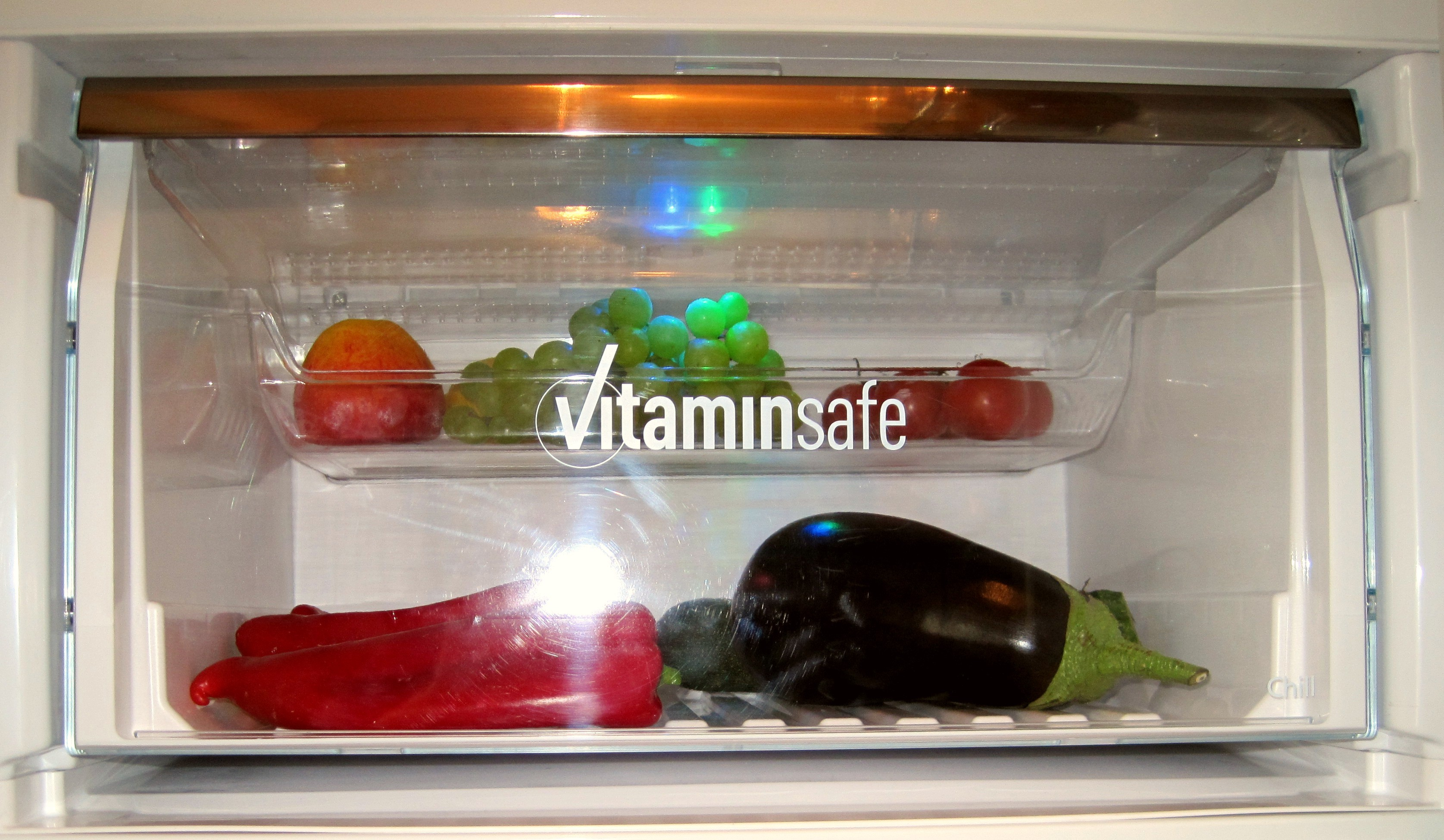 Vitaminsafe: Fach in Gefrierkombi für Obst und Gemüse mit LEDs, die bei geschlossener Tür weiter leuchten, hier zwei blinkende LEDs, die den Blau- und Grünanteil des Sonnenlichts simulieren sollen. Auf diese Weise sollen die natürlichen Schutzmechanismen von Ost und Gemüse aktiviert werden um dem Vitaminabbau, der bei Lagerung im Dunkeln eintritt, entgegenzuwirken. Am Beispiel einer Panasonic Gefrier-Kombination